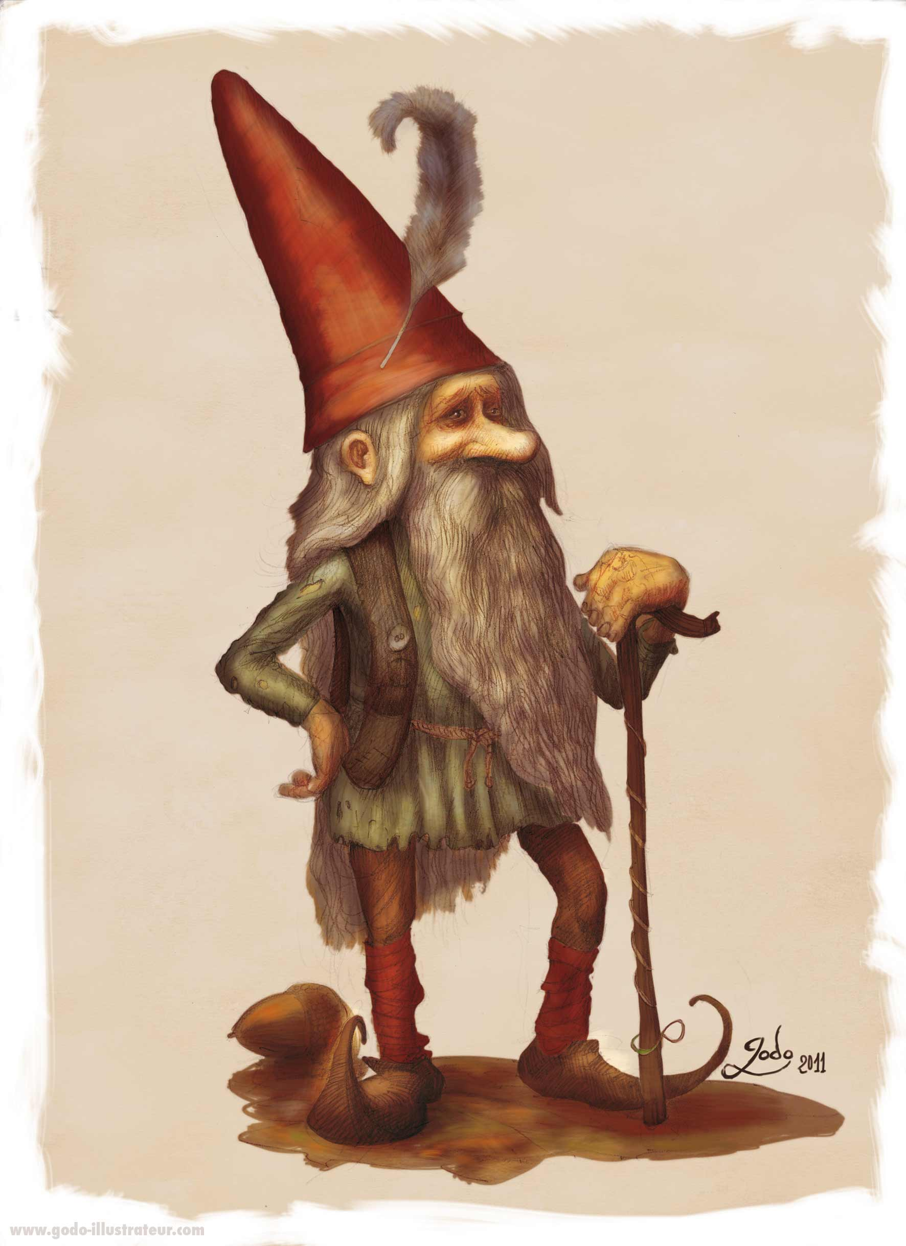 Portrait de lutin réalisé par le dessinateur français professionnel Godo. Technique mixte crayon et tablette graphique, temps de réalisation 4 heures